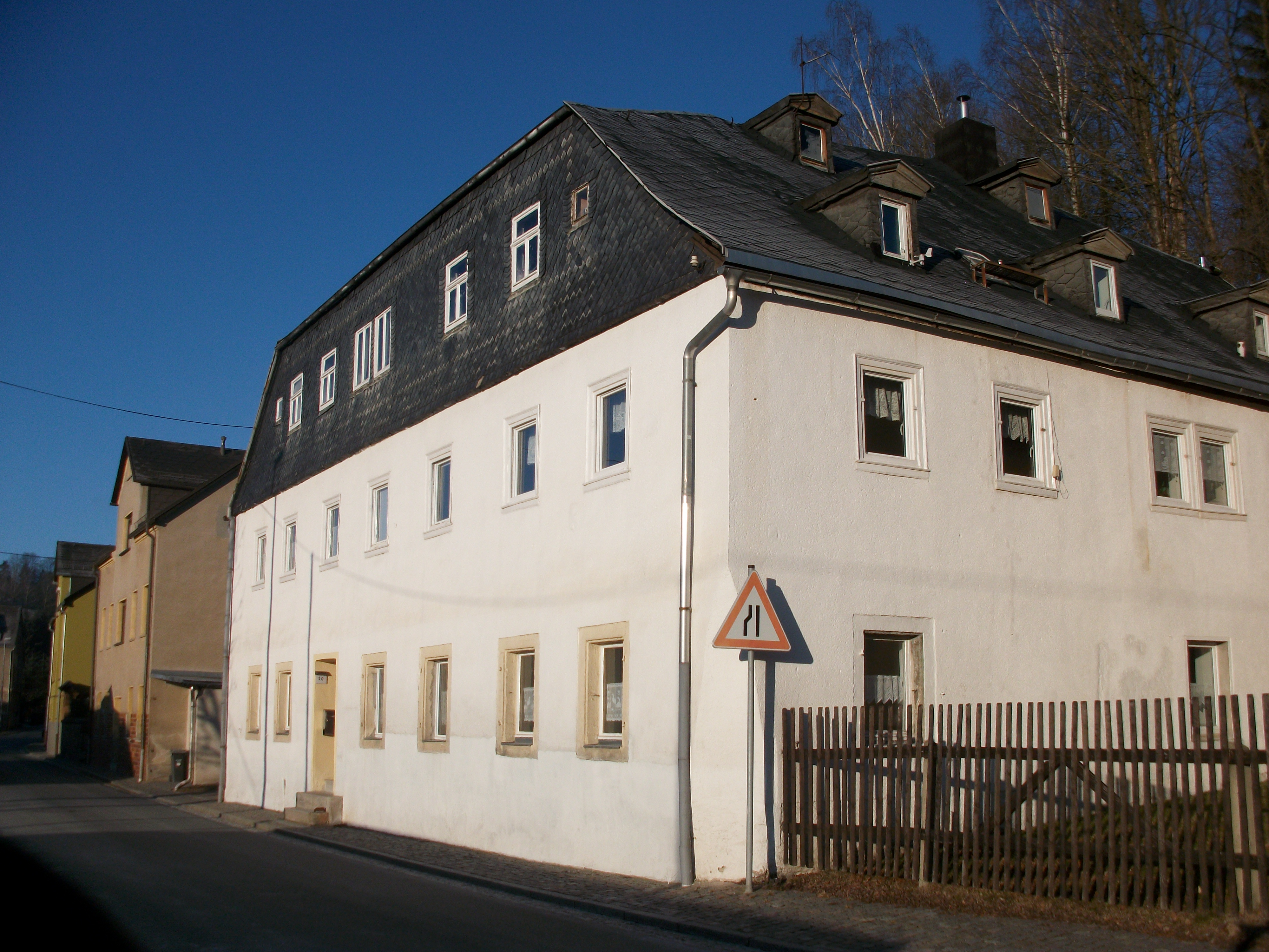 Neustädtel, Forststraße 20